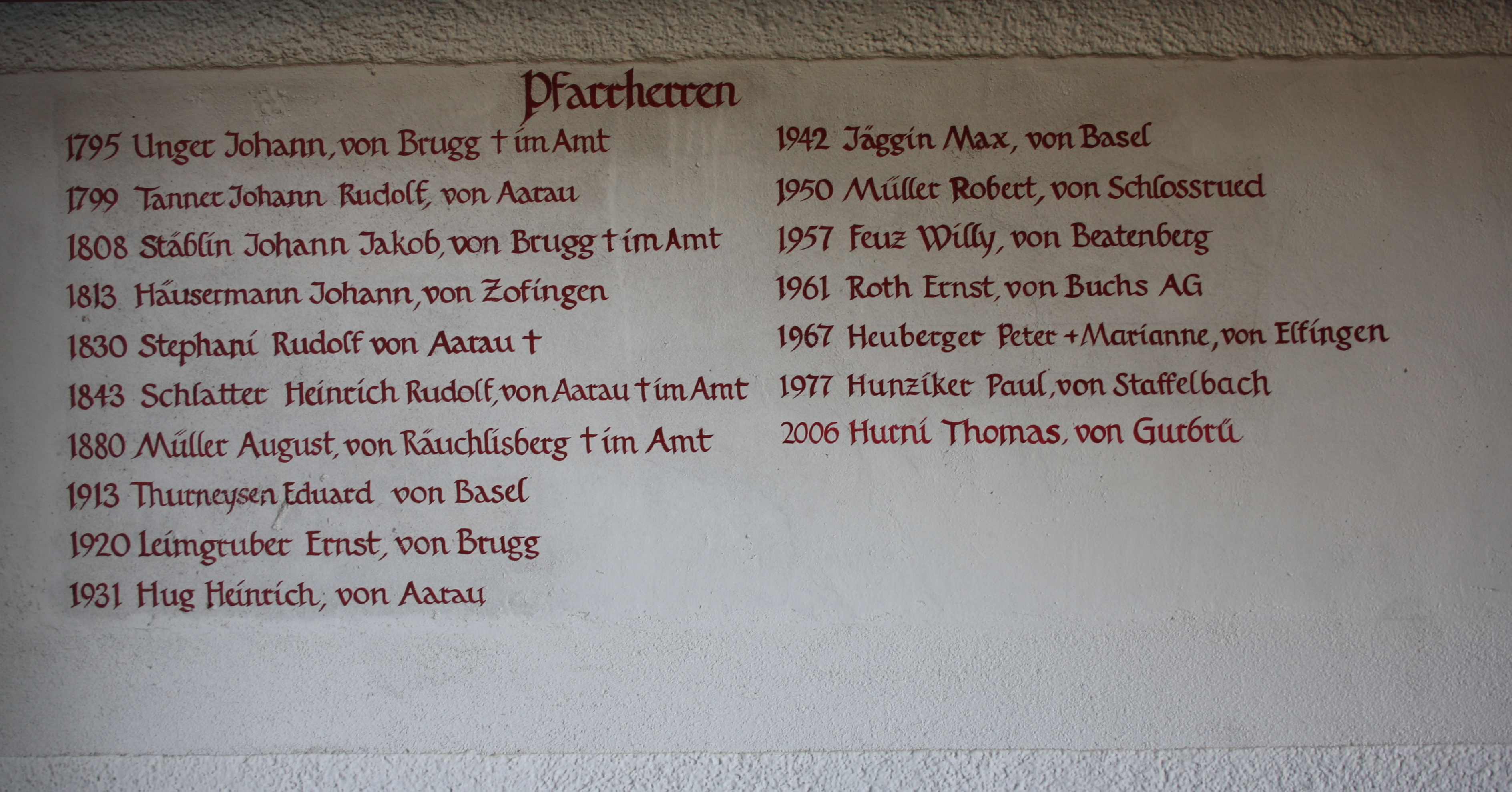 Liste der bisherigen "Pfarrherren" an der Kirchenmauer der reformierten Kirche Leutwil